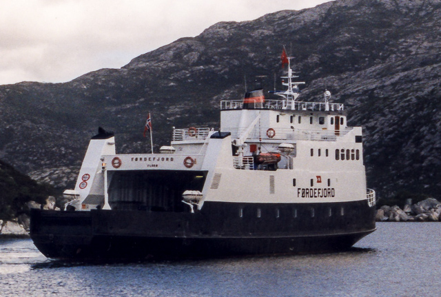 Førdefjord ved Smørhamn 1999.